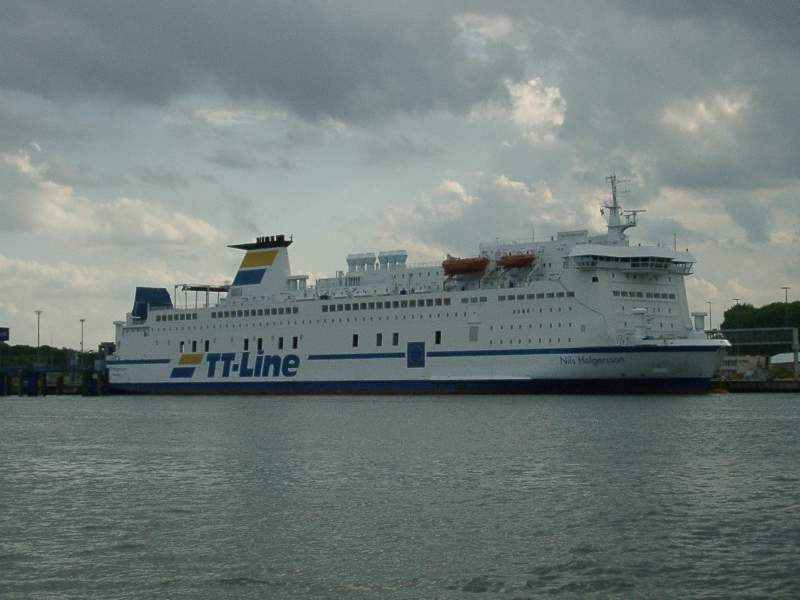 TT-Line vessel Nils Holgersson V